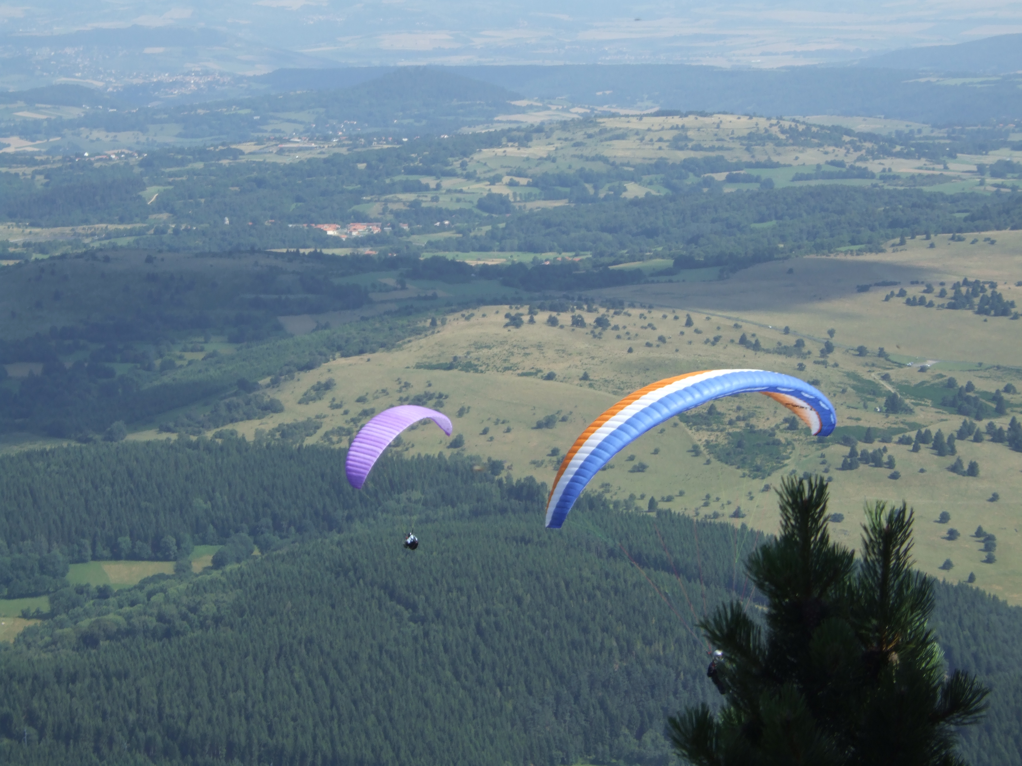 Parapendii in volo attorno al Puy de Dôme.